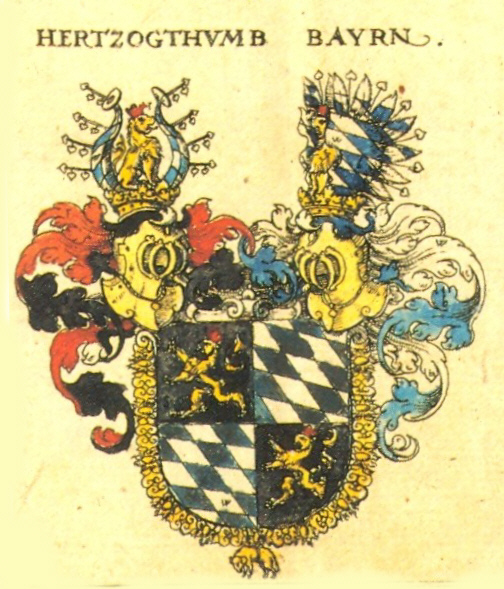 Wappen des Herzogtums Bayern